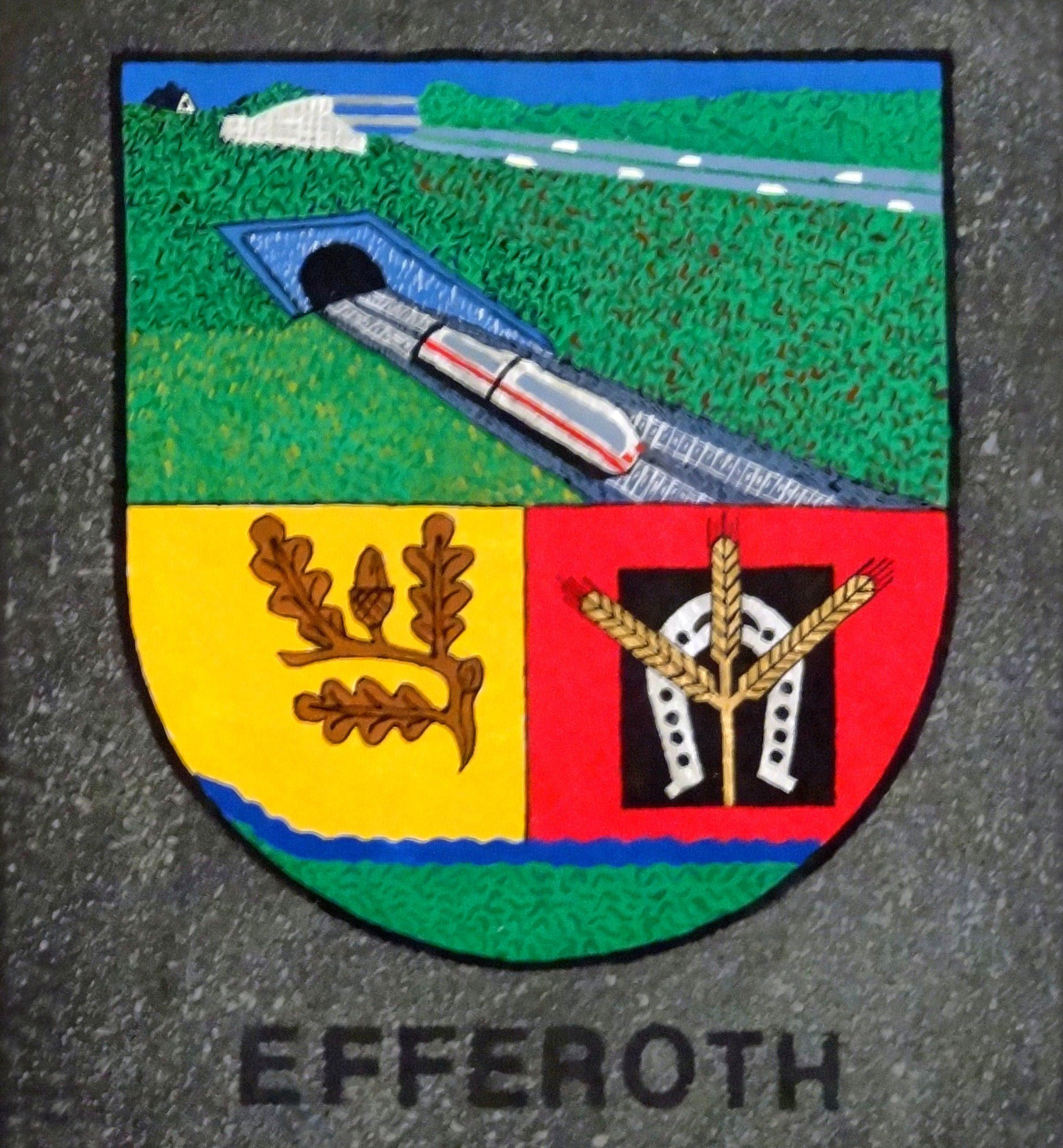 Schiefertafel als Ortswappen von Efferoth, erstellt von Richard Lenzgen